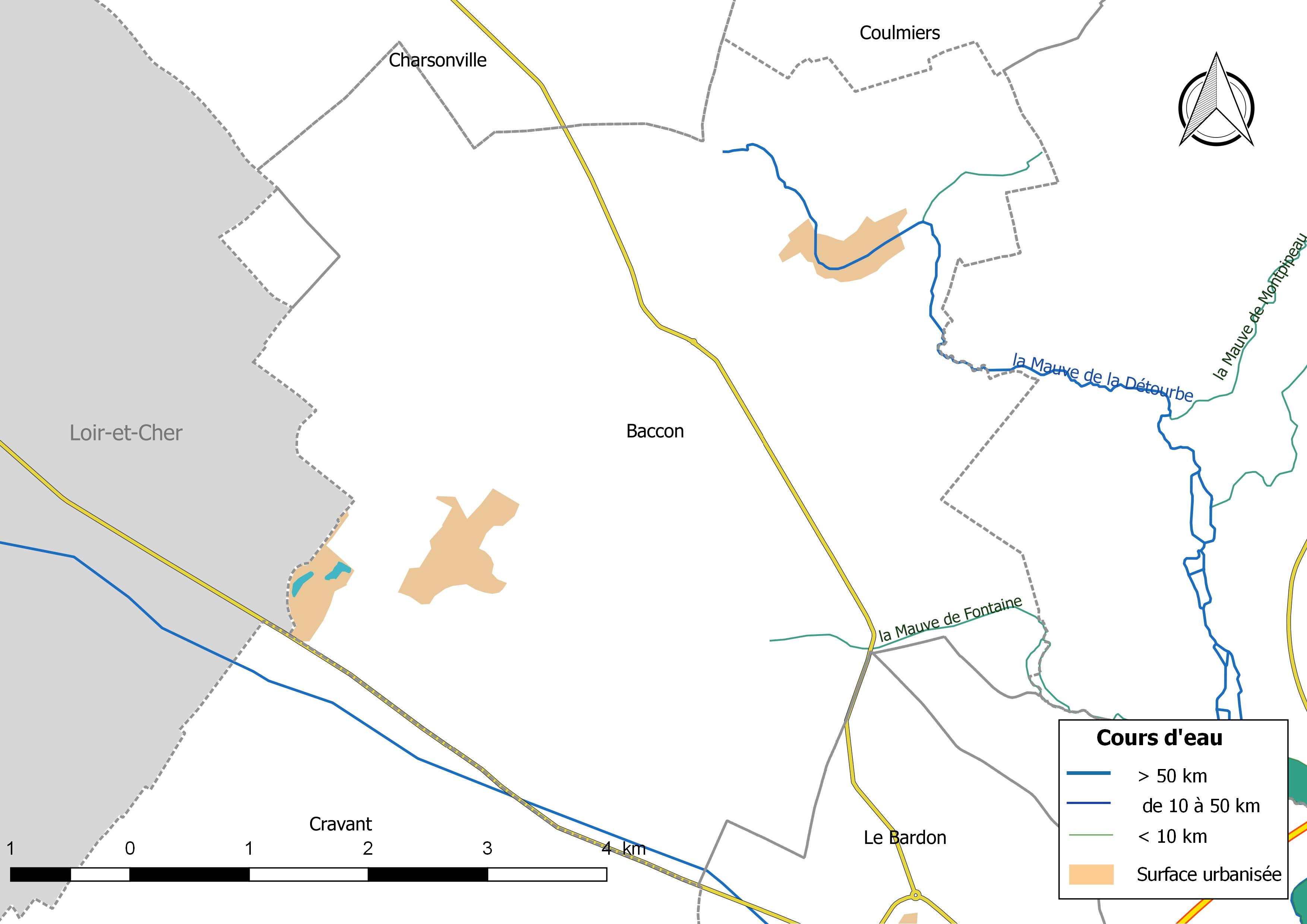 Carte du réseau hydrographique de la commune de Baccon (France).